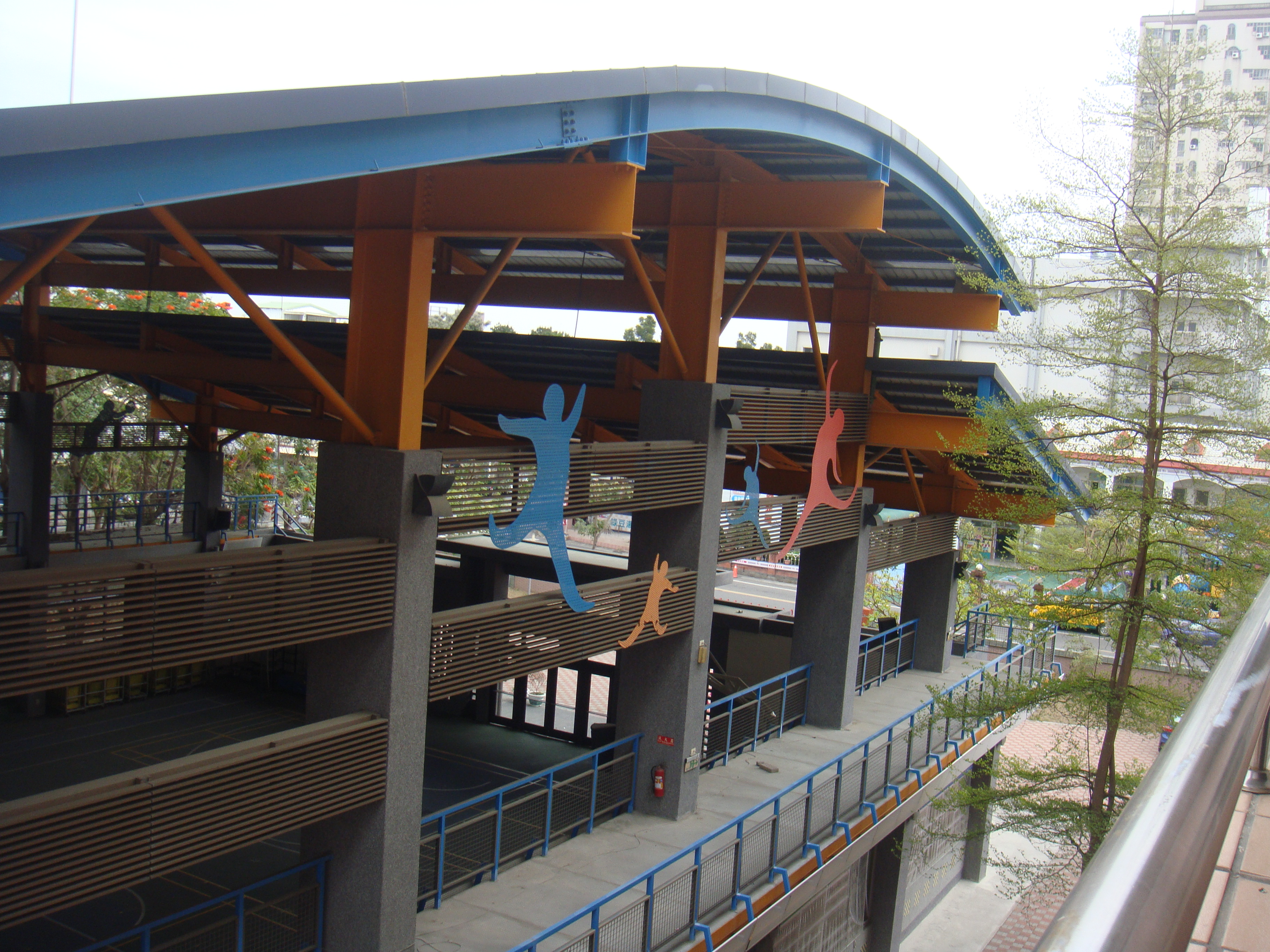 永康復興國小運動館